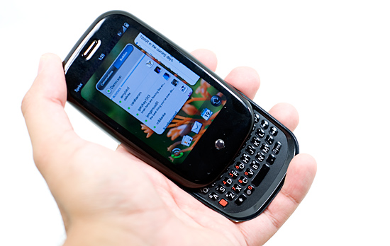 palm pre